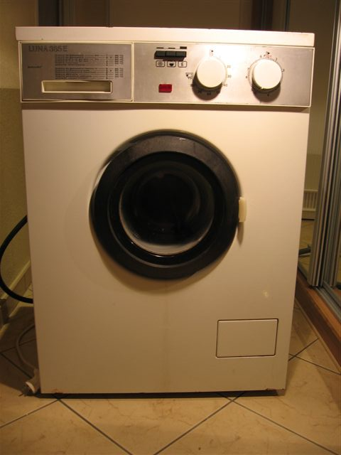 A oto pralka Polar Luna 385E - najpopularniejsza pralka z serii PDE.